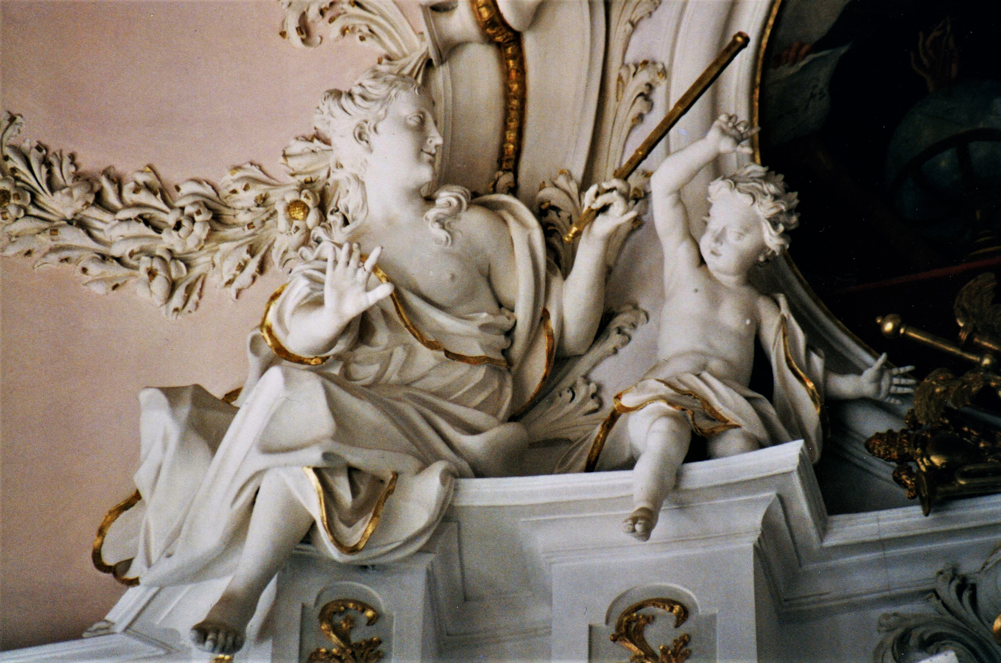 Kaisersaal des Klosters Ottobeuren, Zyklus der 4 Verdienste Kaiser Karls des Großen (1724): SCIENTIAE FAUTORI – Linke Stuckfigur: Allegorie der Naturwissenschaft (Fernrohr)